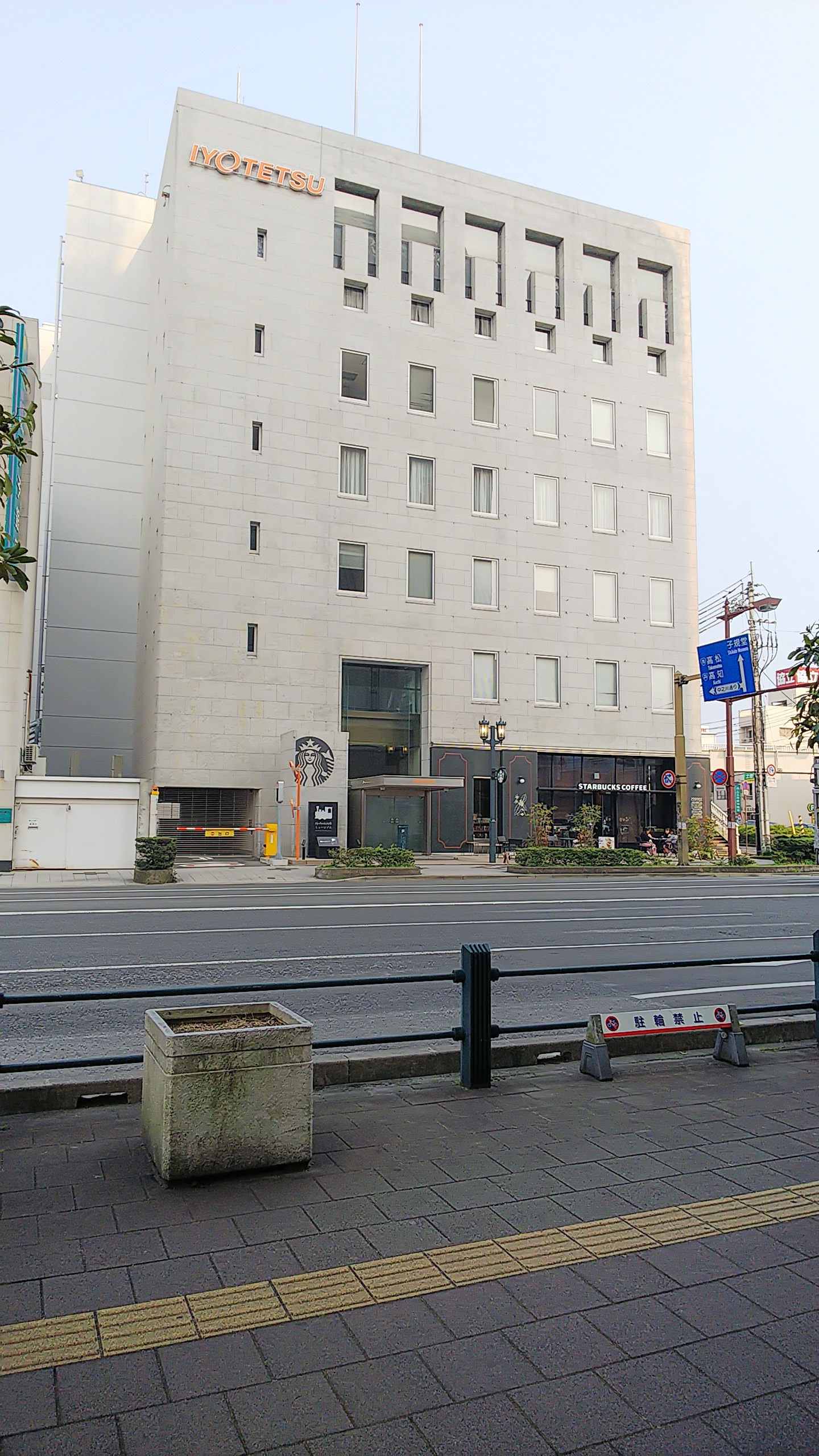 伊予鉄グループ本社。1階にはスターバックスと坊っちゃん列車ミュージアム（スターバックス店舗奥）がある（2019年4月7日撮影）